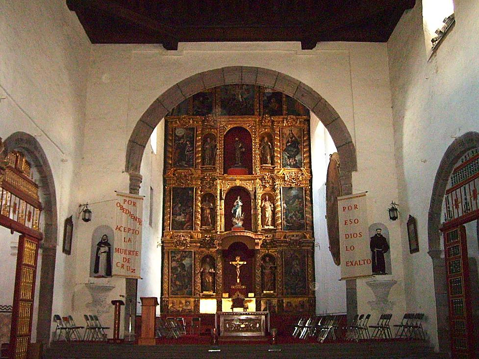 Nave de la Catedral de Nuestra Señora de la Asunción. Tlaxcala, México.